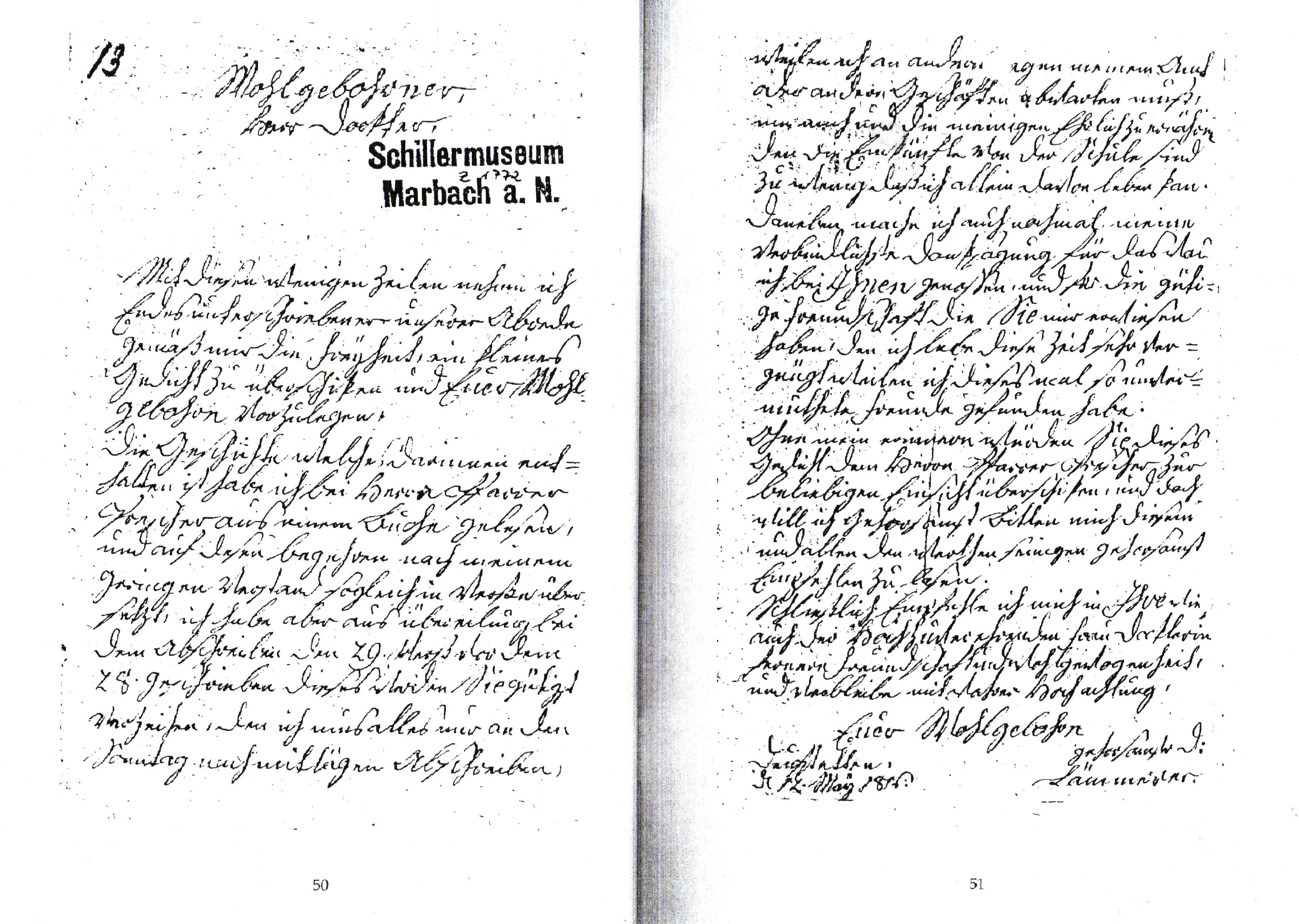 Johannes Lämmerer an Justinus Kerner, Deutsches Literaturarchiv Marbach